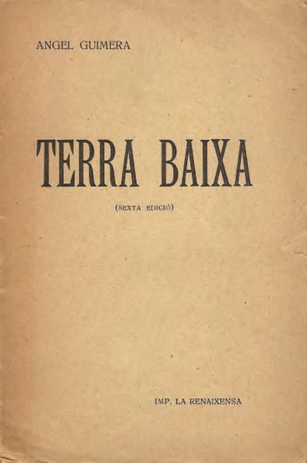 Àngel Guimerà: Terra baixa, Imp. La renaixença, 6a edició.